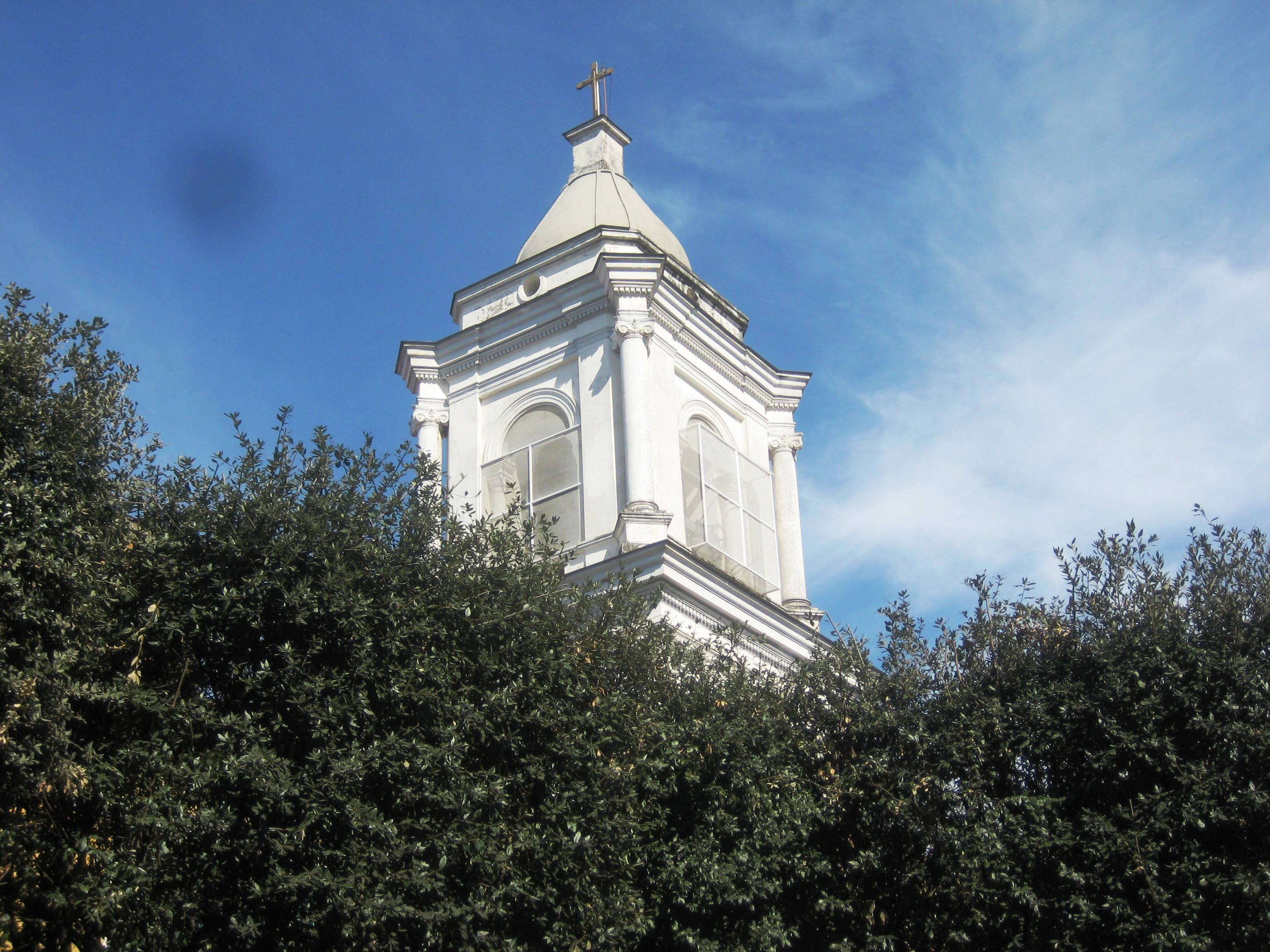 Campanile della Chiesa Matrice di Striano da Piazza IV novembre